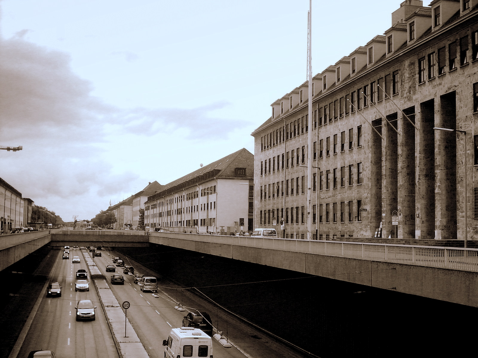 ehemalige McGraw-Kaserne München-Giesing, McGraw-Graben, Blick Richtung Süden